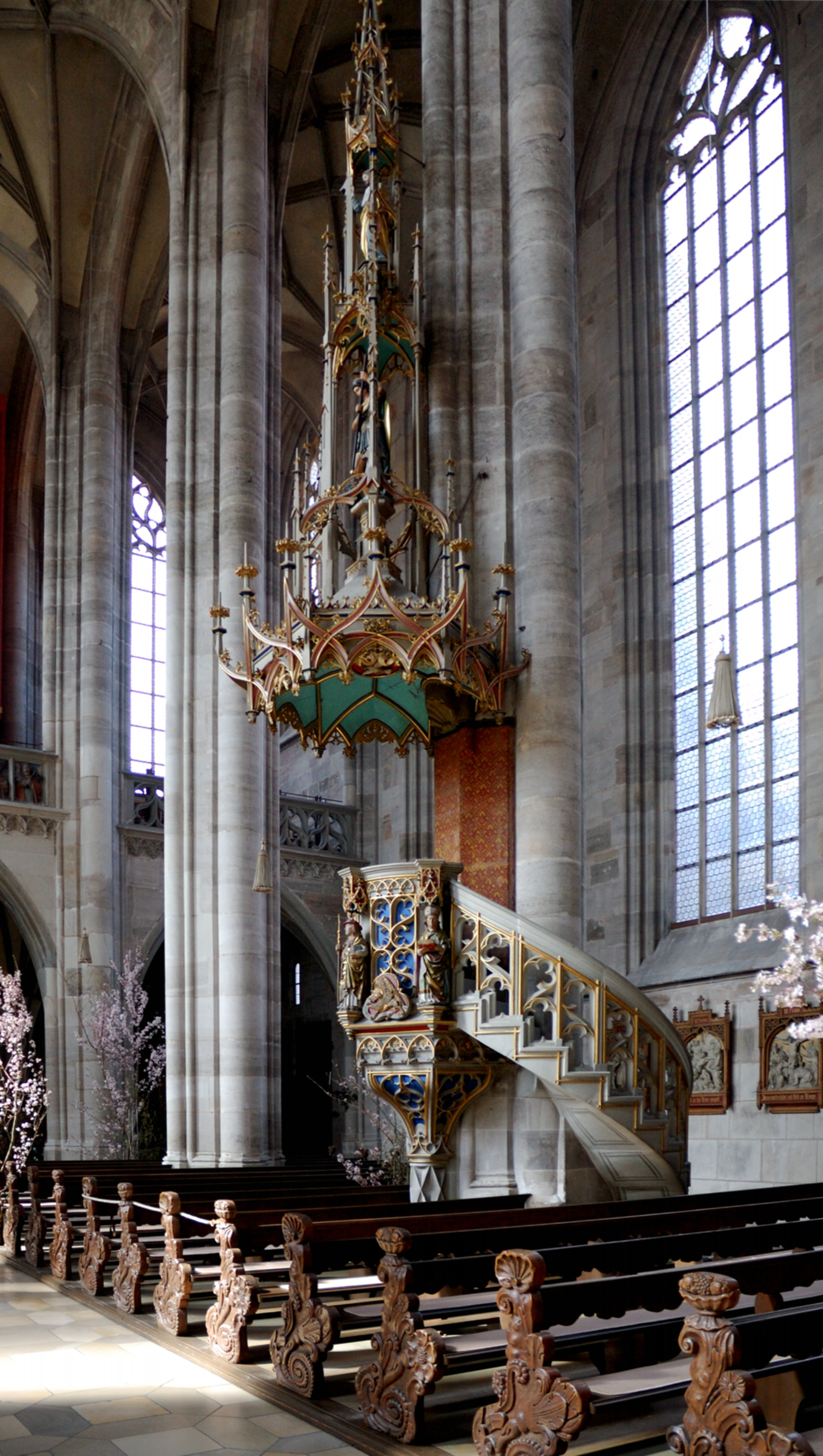 St. Georg Dinkelsbühl, Kanzel